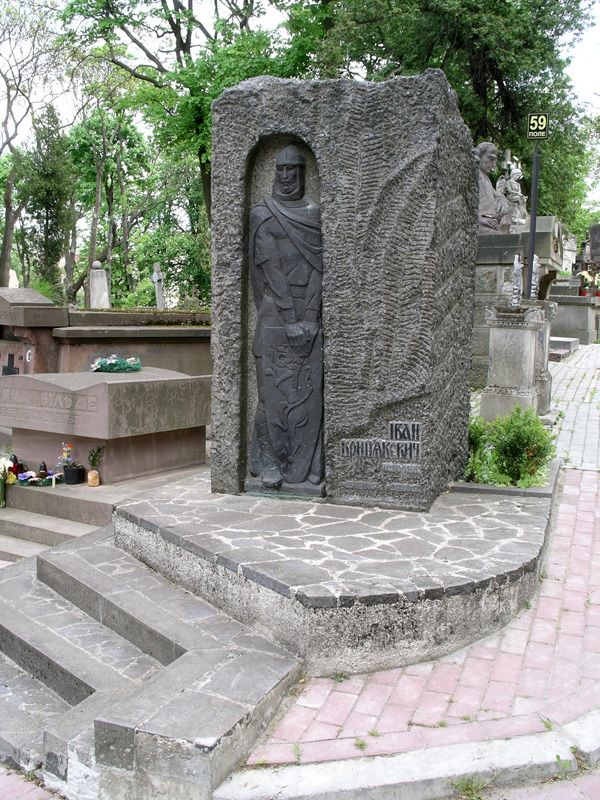 Tomb of Ivanu Kryp'jakevychu. Lychakivs'kyj cemetery in Lviv photo by Oleh Petriv. 2006